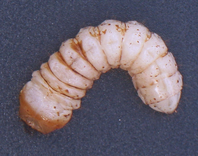 Cerambycidae: subfam. Lamiinae (Boktor larve)